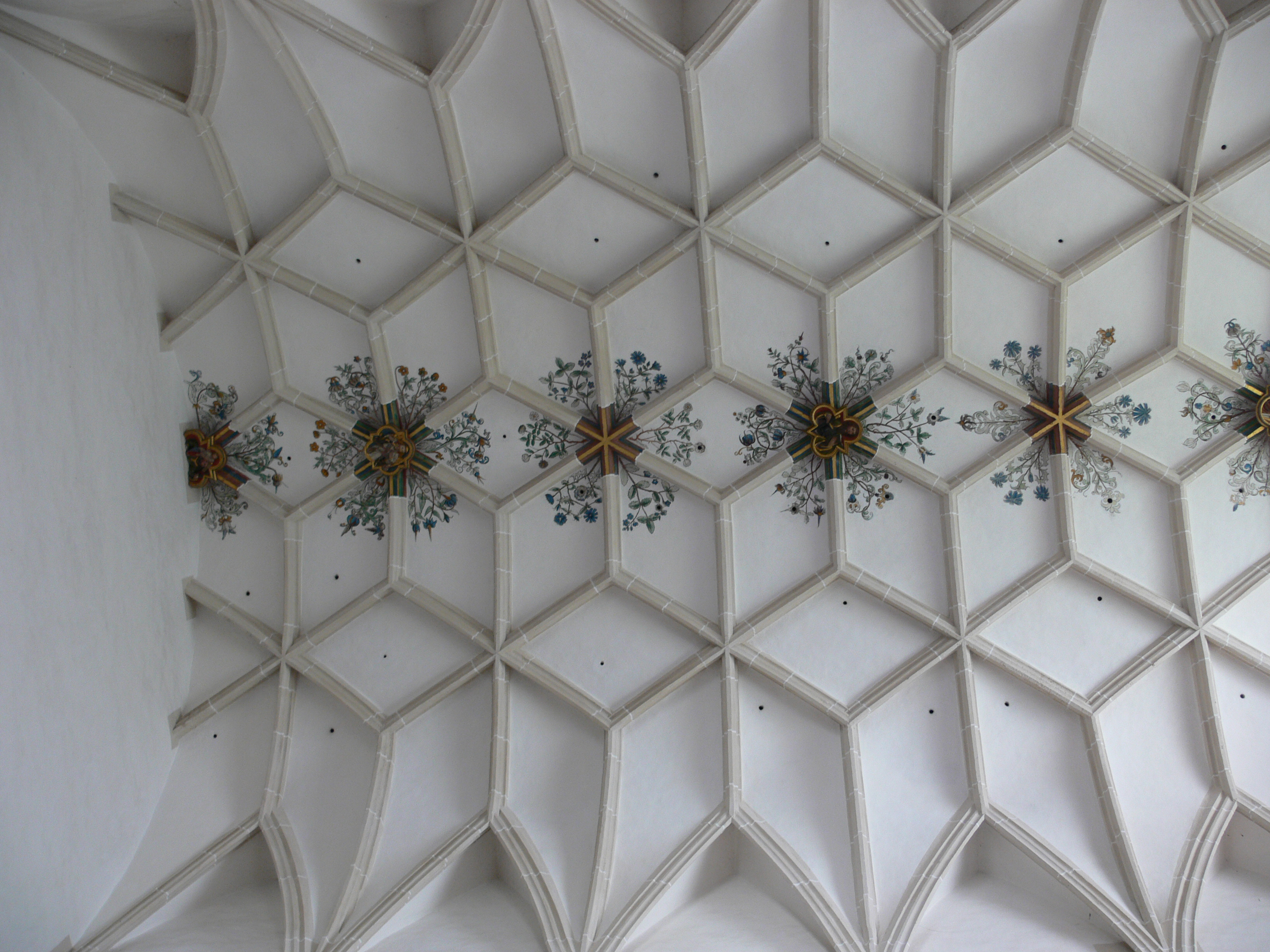 Kloster Blaubeuren, Petrikapelle, Gewölbe